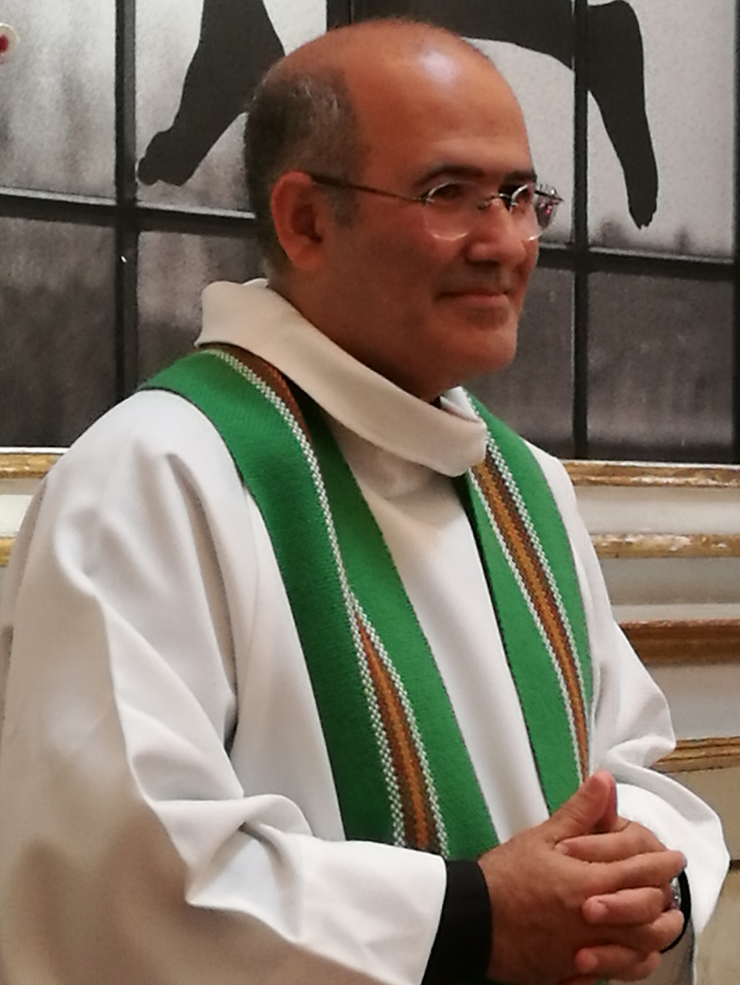 José Tolentino Mendonça, en qualité de chapelain de la Capela do Rato à Lisbonne